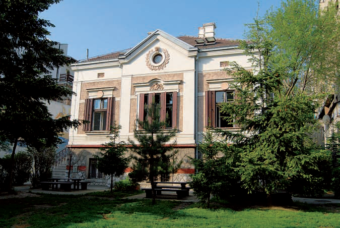 кућа Драгомира Арамбашића, С.Неговановић